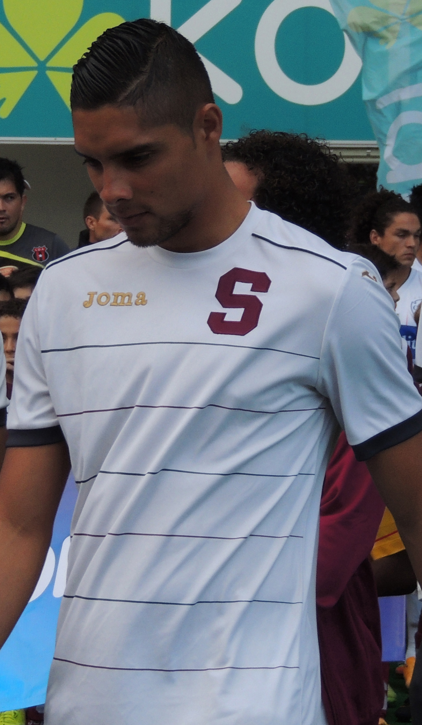 Esta obra de Luis Manuel Madrigal está bajo una licencia de Creative Commons Reconocimiento-CompartirIgual 4.0 Internacional. Para una versión sin logo escriba a